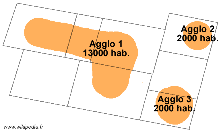 Schéma illustrant l'article sur la notion d'unité urbaine (2 sur 6)